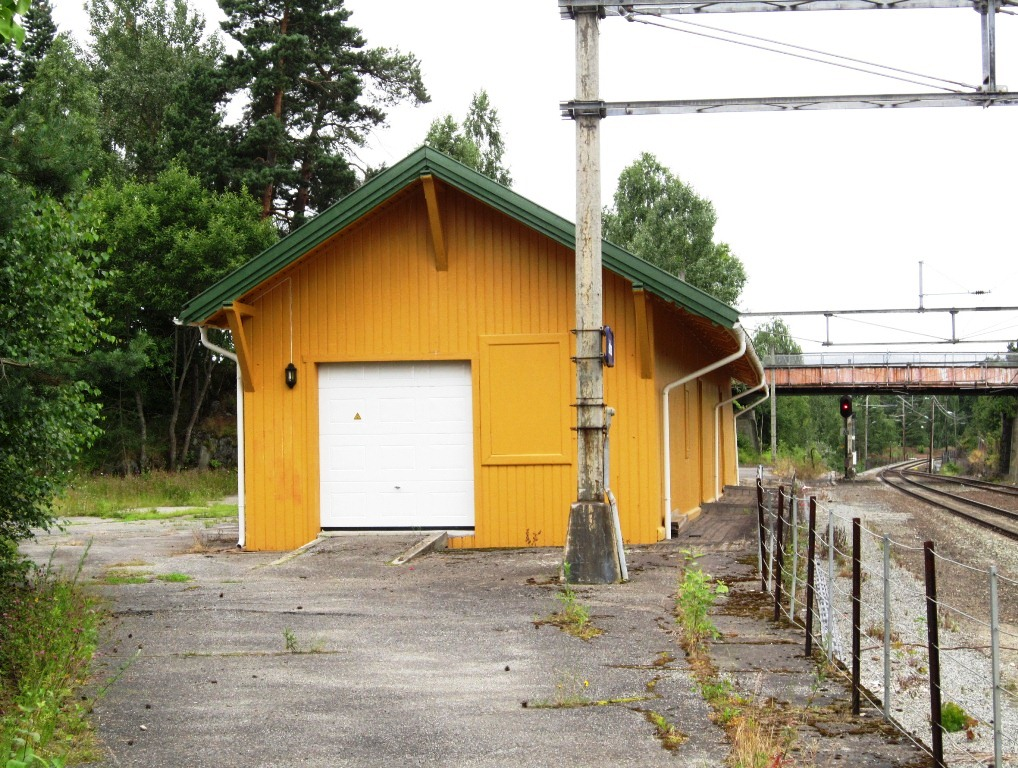 Geithus stasjon ved Randsfjordbanen